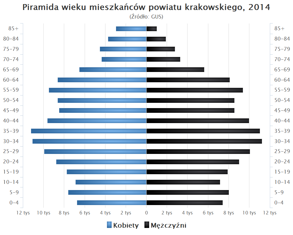 Piramida wieku mieszkańców powiatu krakowskiego, 2014